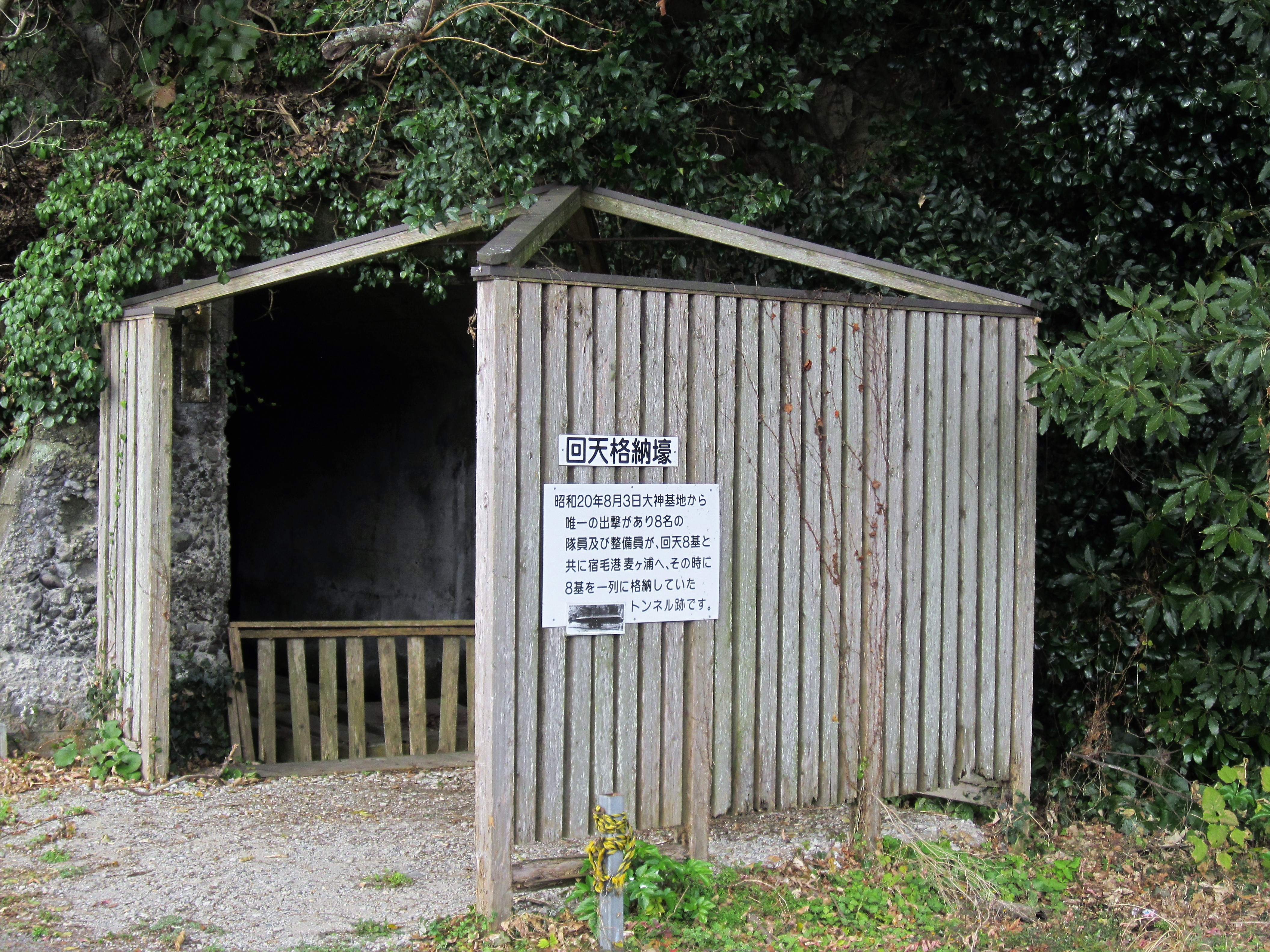 「回天」大神訓練基地跡の格納壕 Canon PowerShot A2200